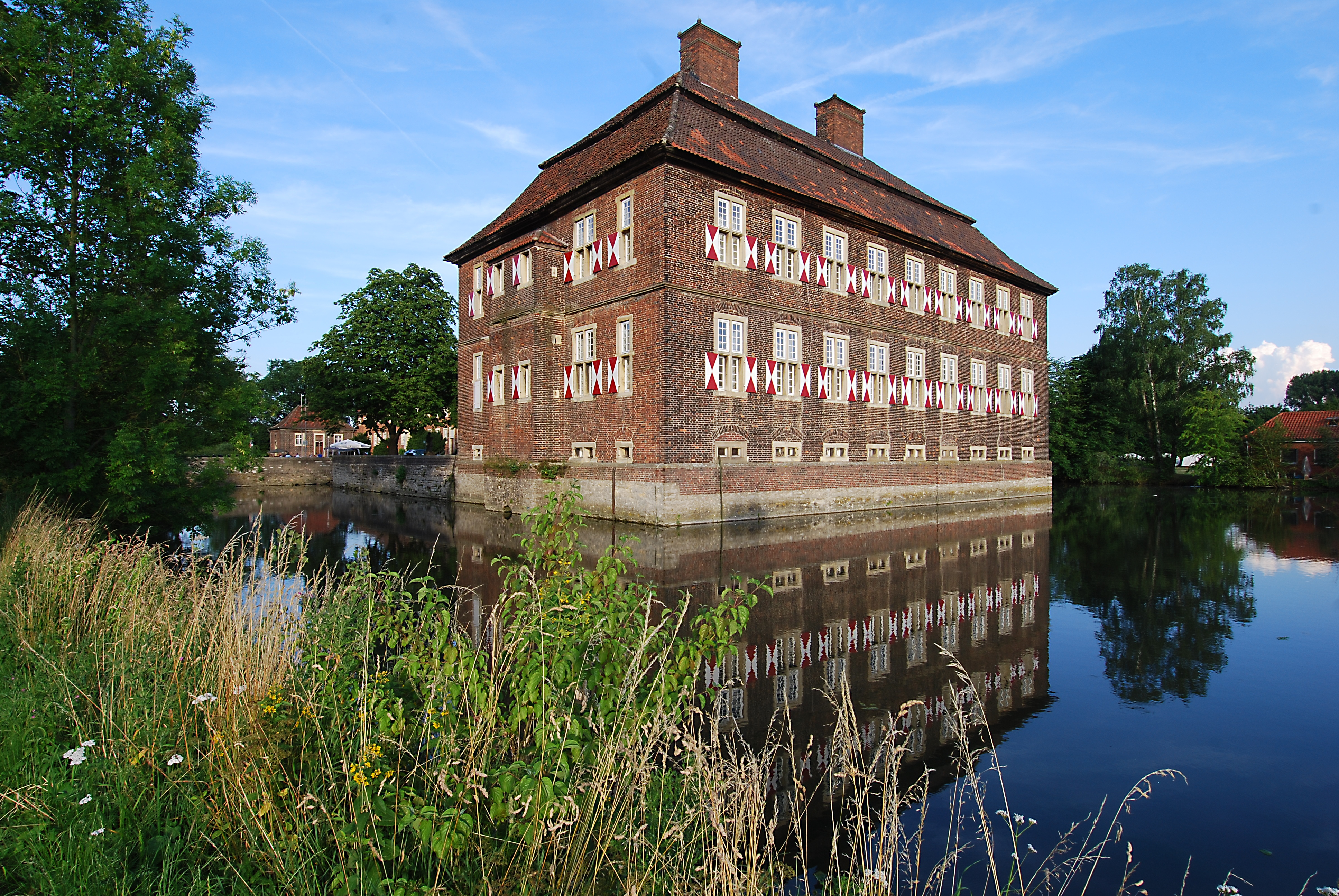 Schloss Oberwerries im Stadtbezirk Heessen der kreisfreien Stadt Hamm in Nordrhein-Westfalen